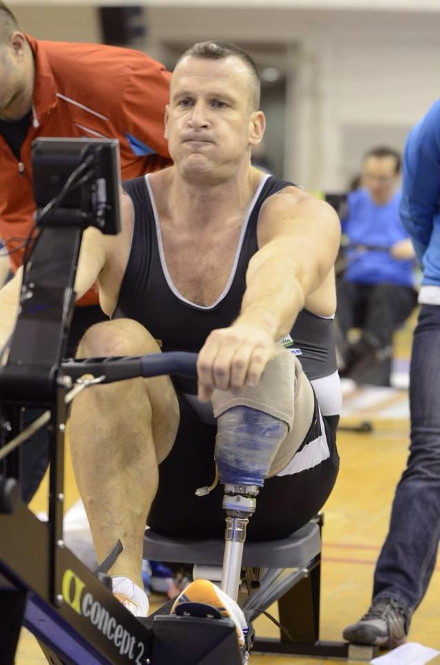 ergomèrtre